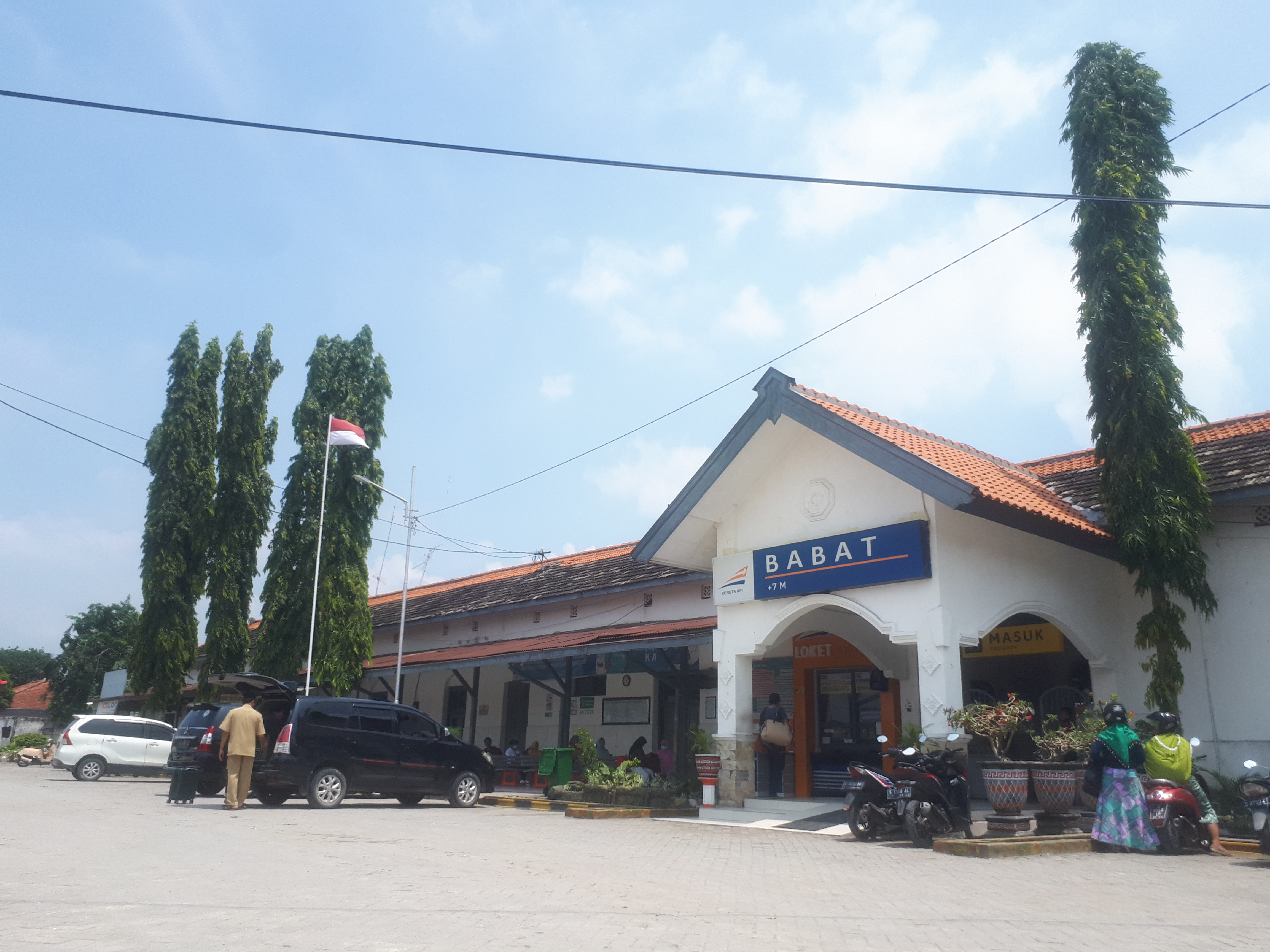 Tampak depan Stasiun Babat tahun 2020